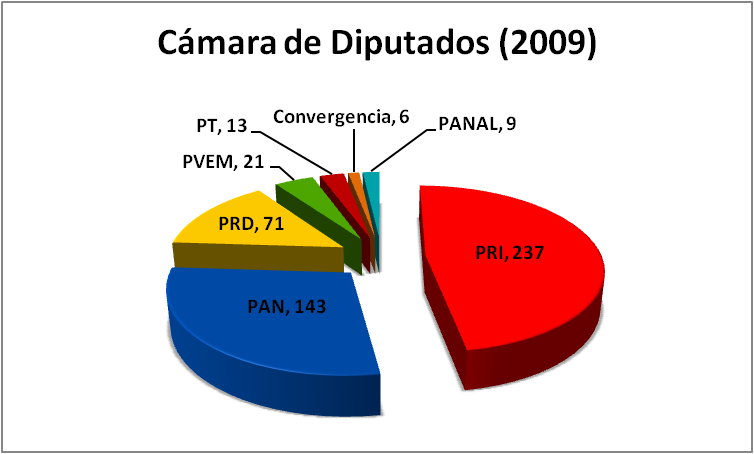 Gráfico de la composición de la Cámara de Diputados de los Estados Unidos Mexicanos en el año 2009.